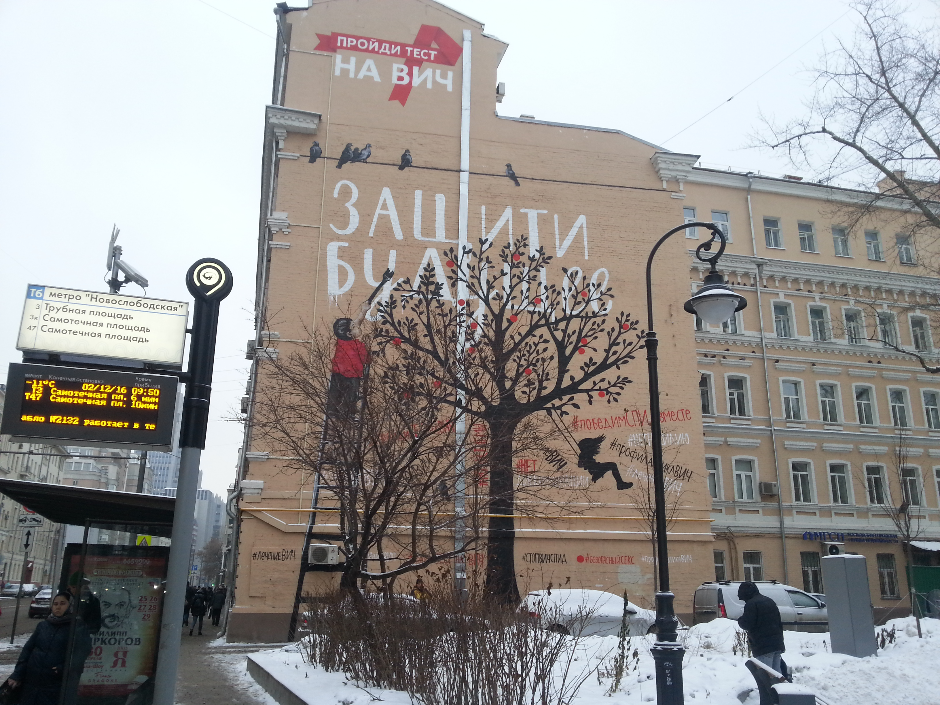 Долгоруковская улица. Социальная реклама ко Всемирному дню борьбы со СПИДом. 2 декабря 2016г.